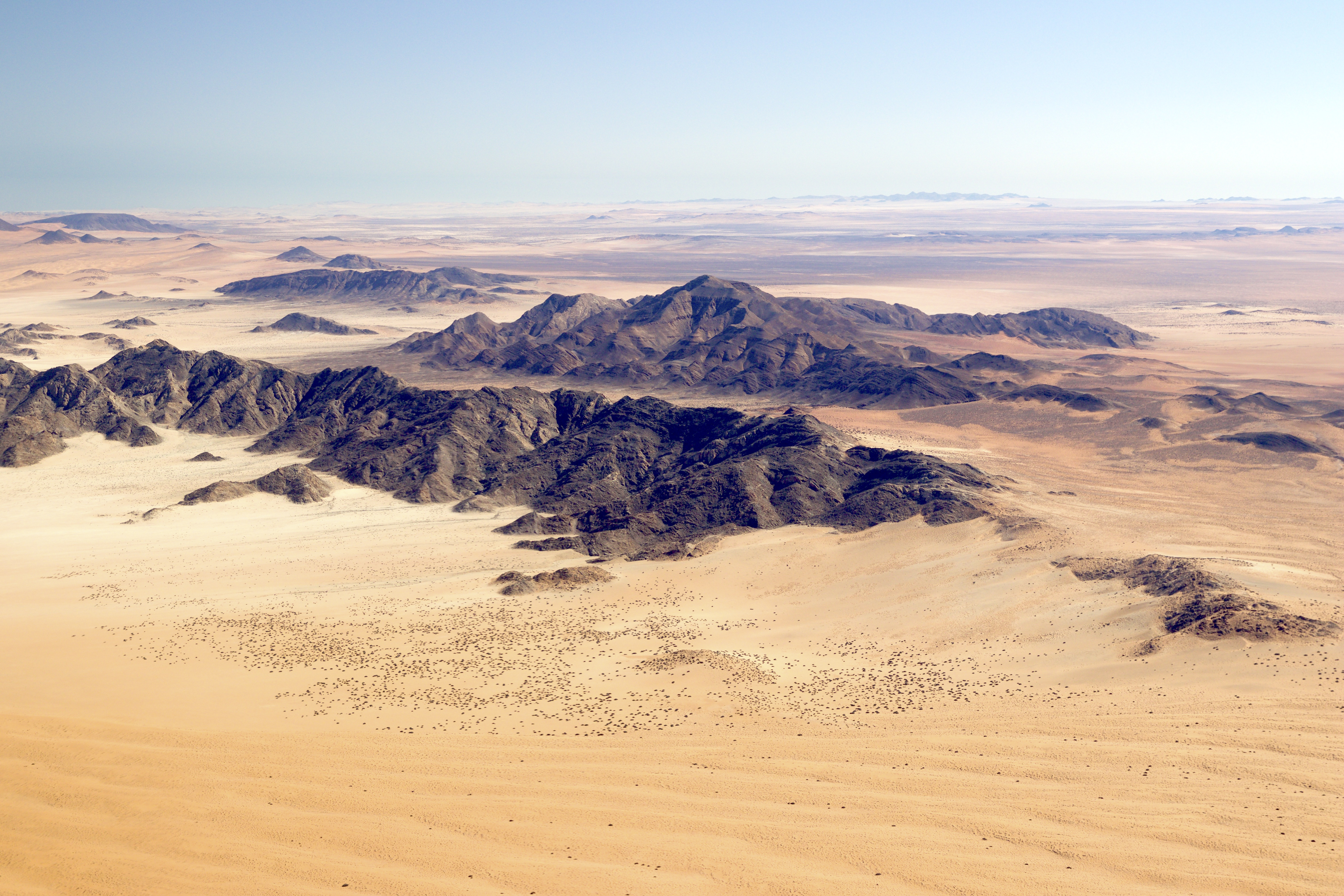 Heioab Luftaufnahme 2018